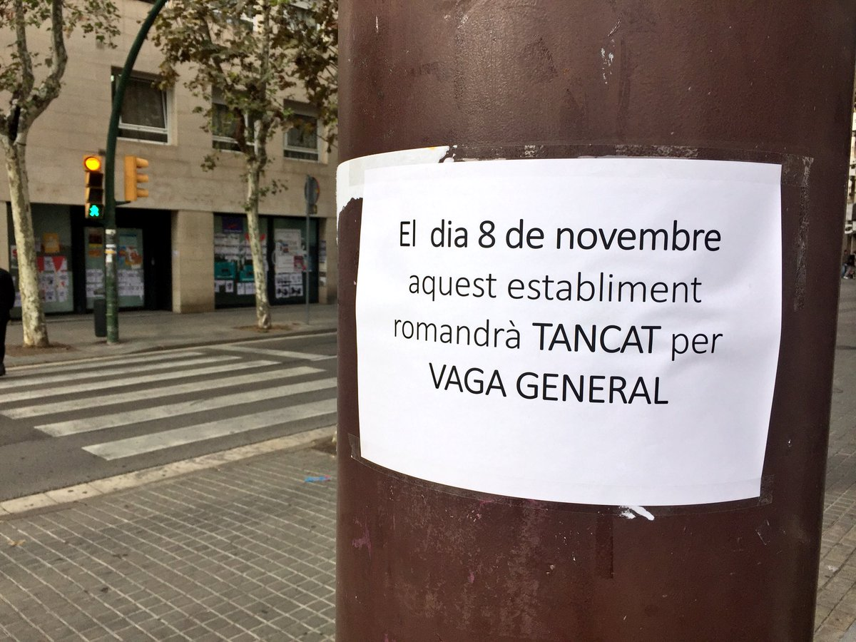 Comerç tancat per Vaga general catalana de novembre de 2017